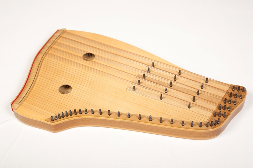 Poolkromaatiline rahvakannel on valmistatud Tallinna klaverivabrikus 1980. aastatel. Kannelt on kasutatud laulu- ja kandlekapell Simmaniduo ning kandlemees Sander Karu kandlemuusika lindistustel ja avalikel esinemistel.